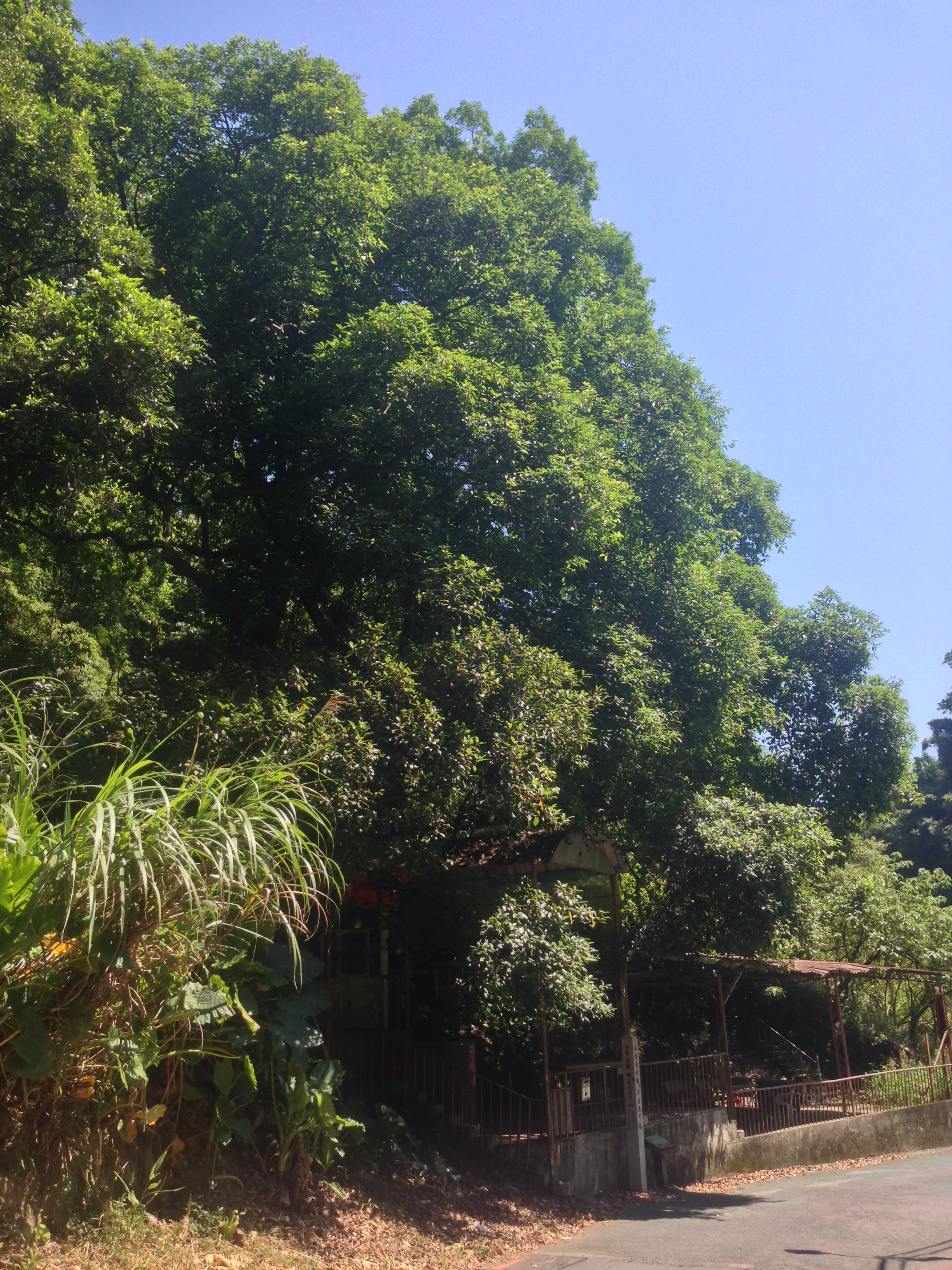 中文（台灣）: 新店九丁榕樹公廟